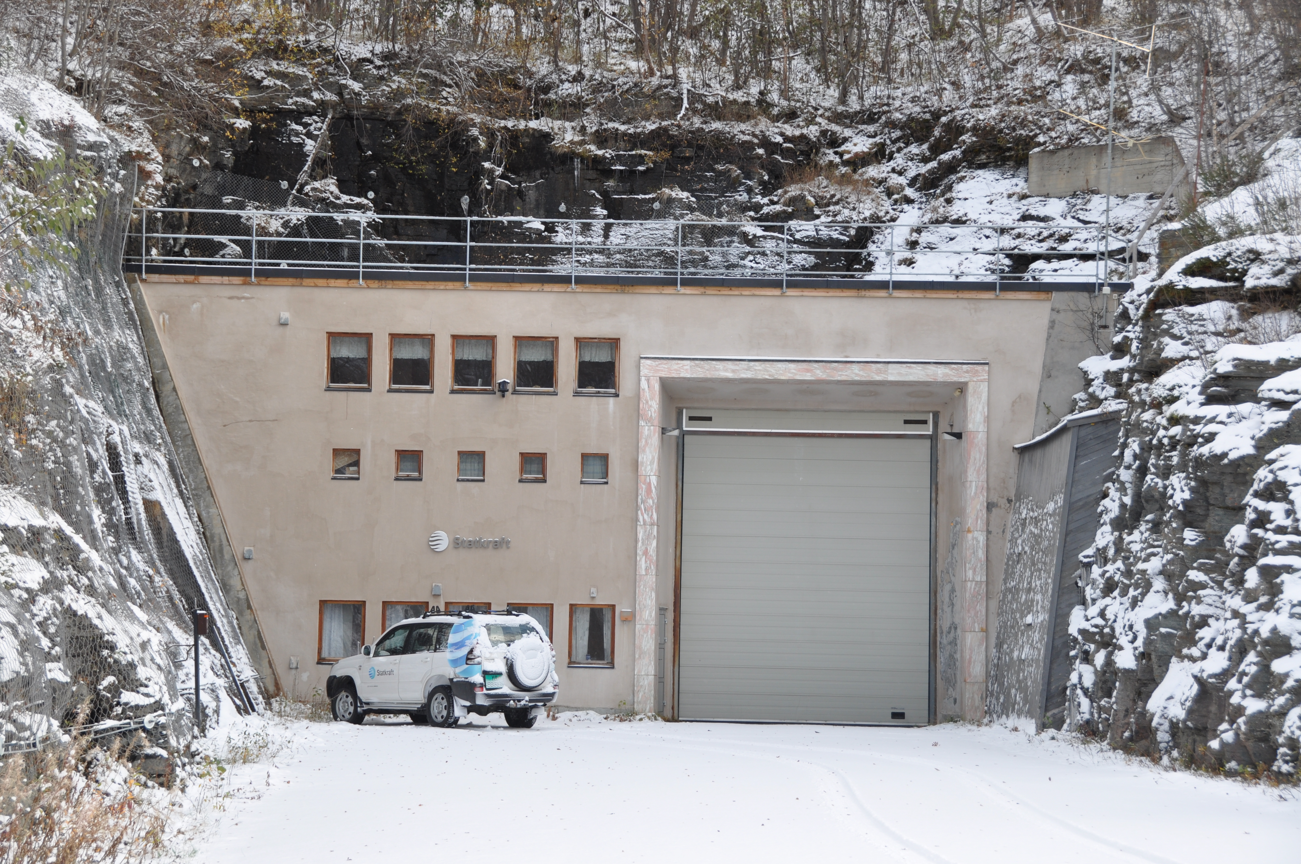 Innset kraftverk sør i Troms ble satt i drift i 1960, og var helt avgjørende for kraftforsyningen i denne regionen. Dato: 08.10.2009